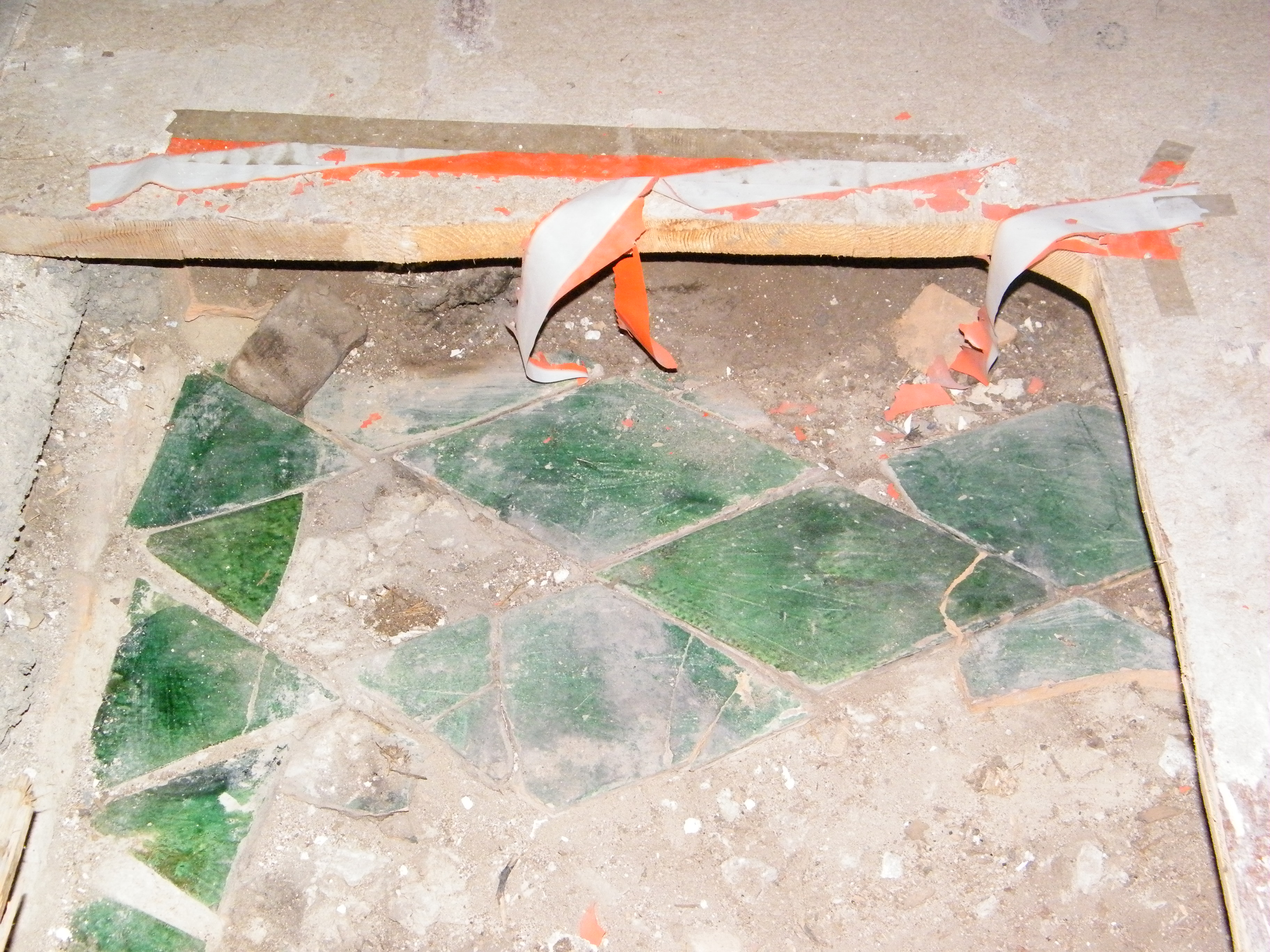 Grüne Fliesen im Beginenhaus Kempten